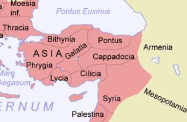 Azja Mniejsza w czasach rzymskich